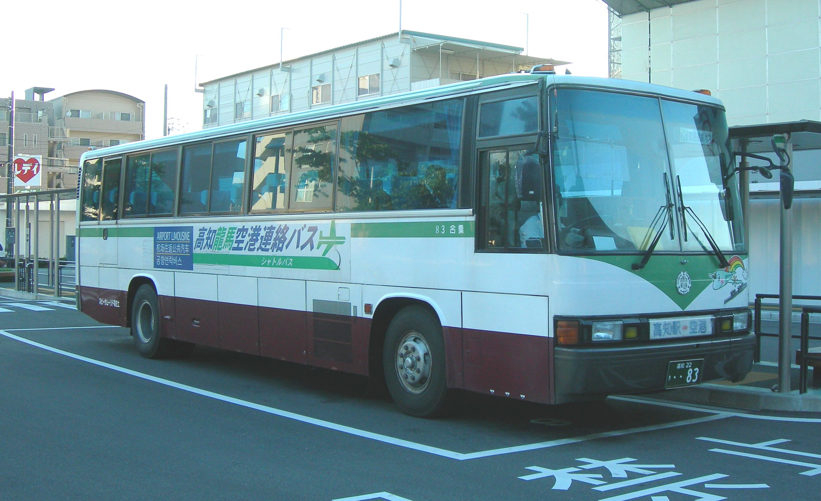 土佐電ドリームサービス 路線バス